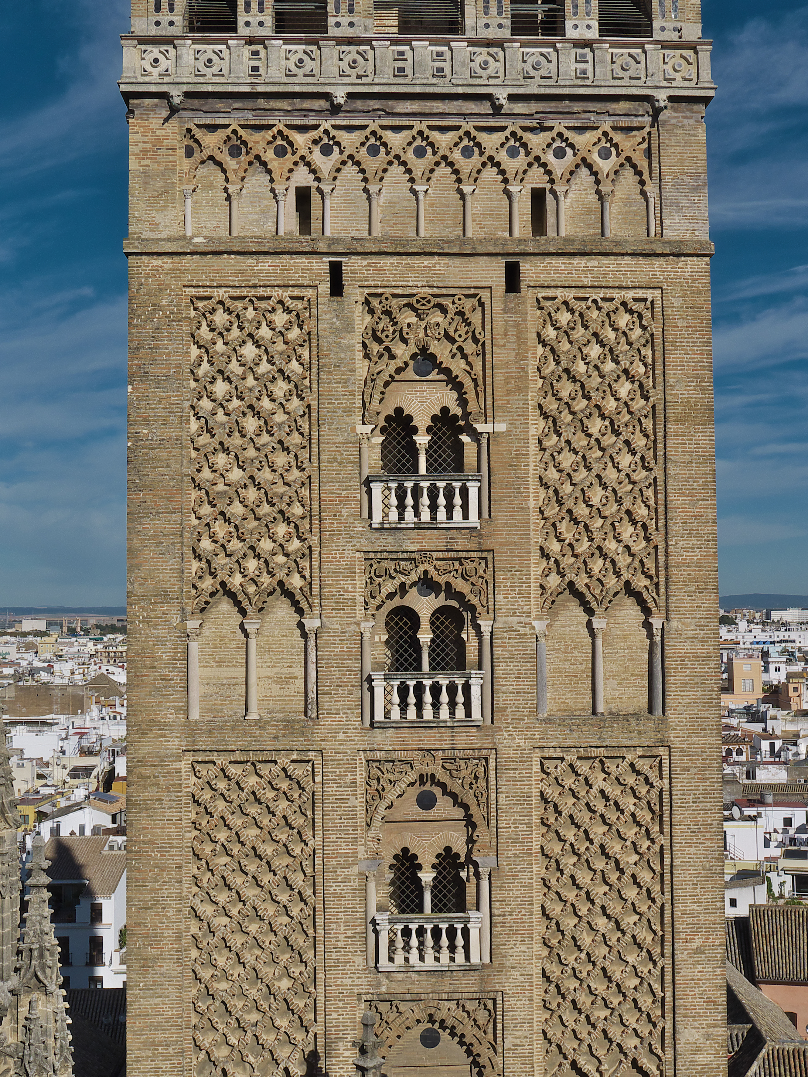 Vista parcial de la cara sur de la Giralda